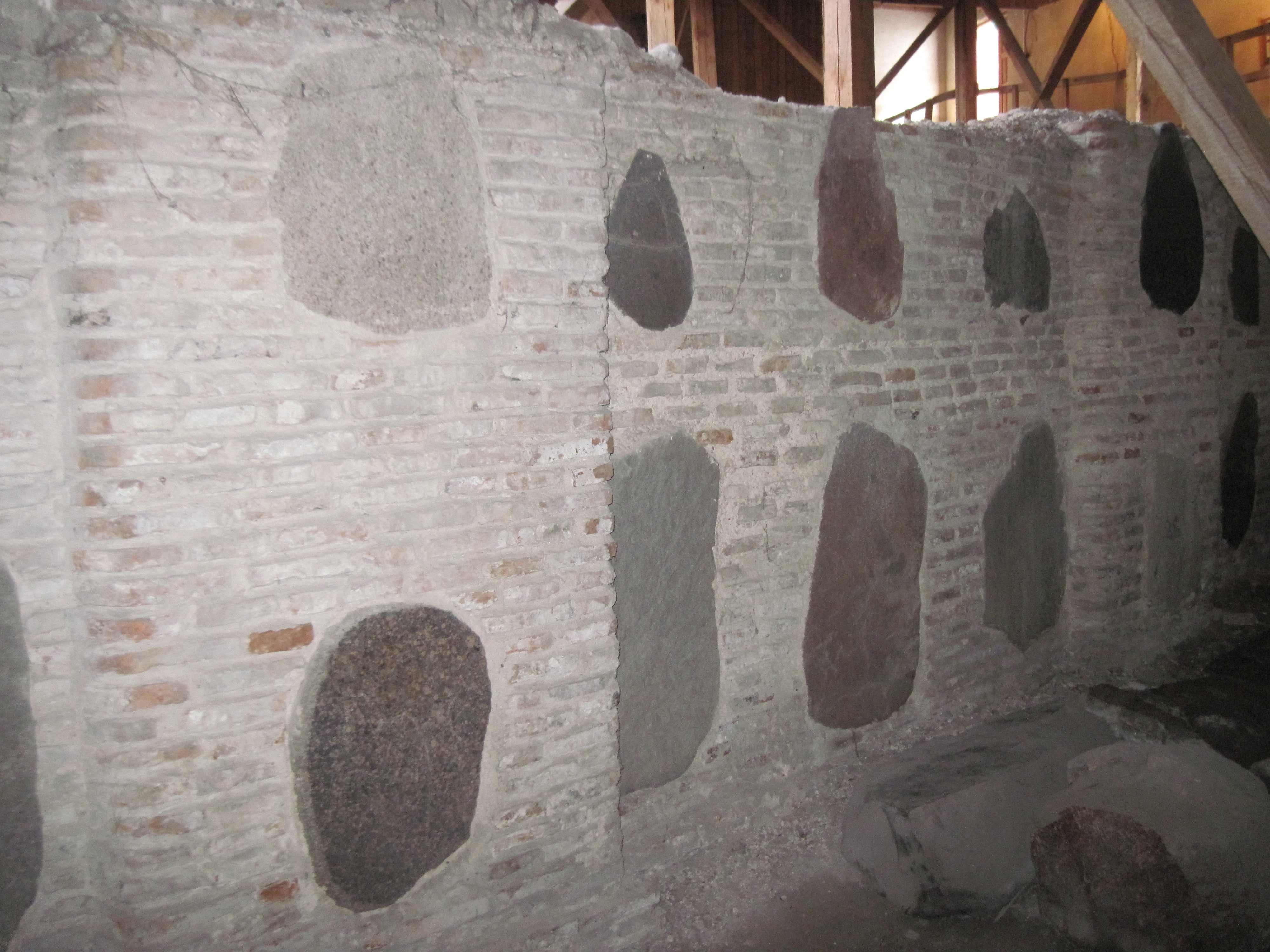 Сцяна Ніжняй царквы ў Гродне, Стары замак